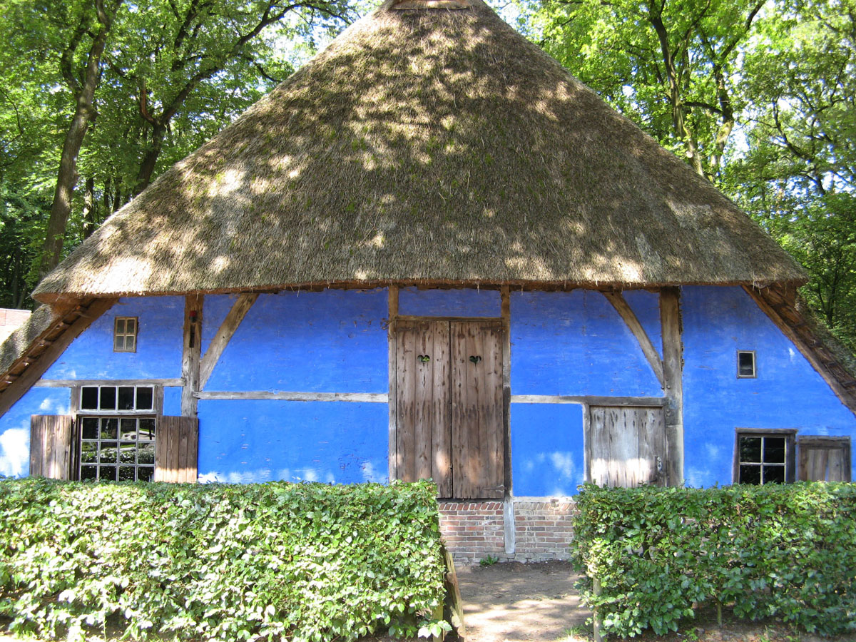 Blauw Los Hoes, Harreveld, gemeente Lichtenvoorde, 1920, 1.2 101blauw los hoes (harreveld)02